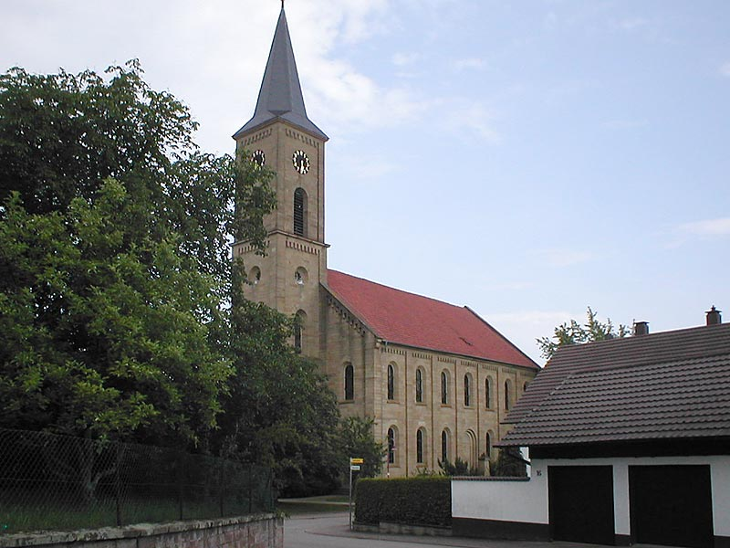 Evang. Kirche in Kraichtal-Menzingen